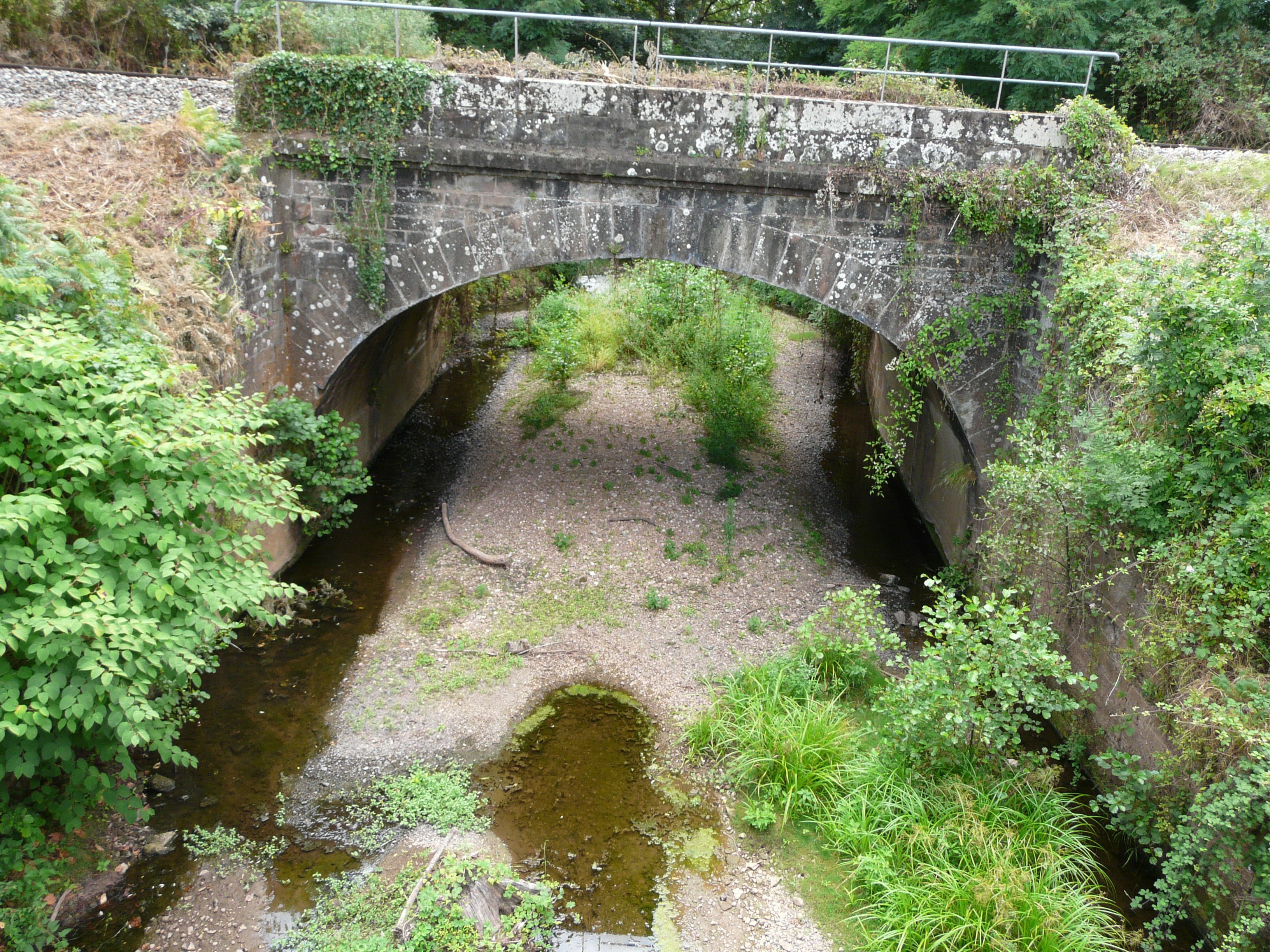 La Logne près de la Rivière de Mansac, en aval du pont de la route départementale 147, en limites des communes de Mansac (à gauche) et Cublac (à droite) ; Corrèze, France. Le lit est quasiment à sec, en période de sécheresse prolongée.